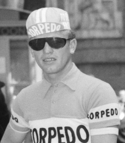 Ploegen van de Ronde van Nederland aan de start, Duitse (Torpedo) ploeg